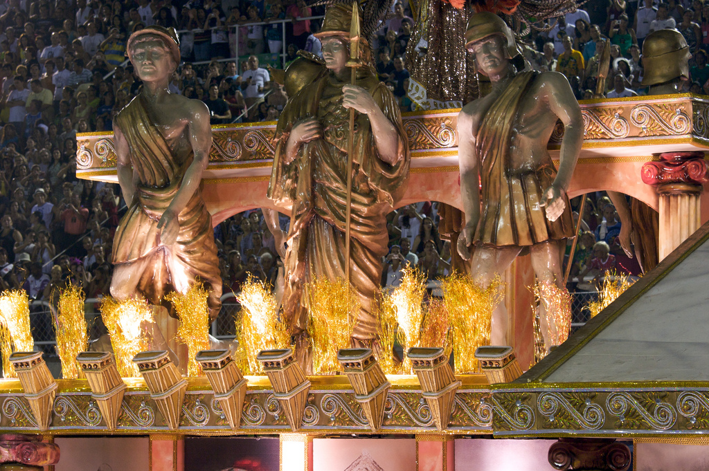 Desfiles na Marquês de Sapucaí 2010. Fotos Carlos Morel.